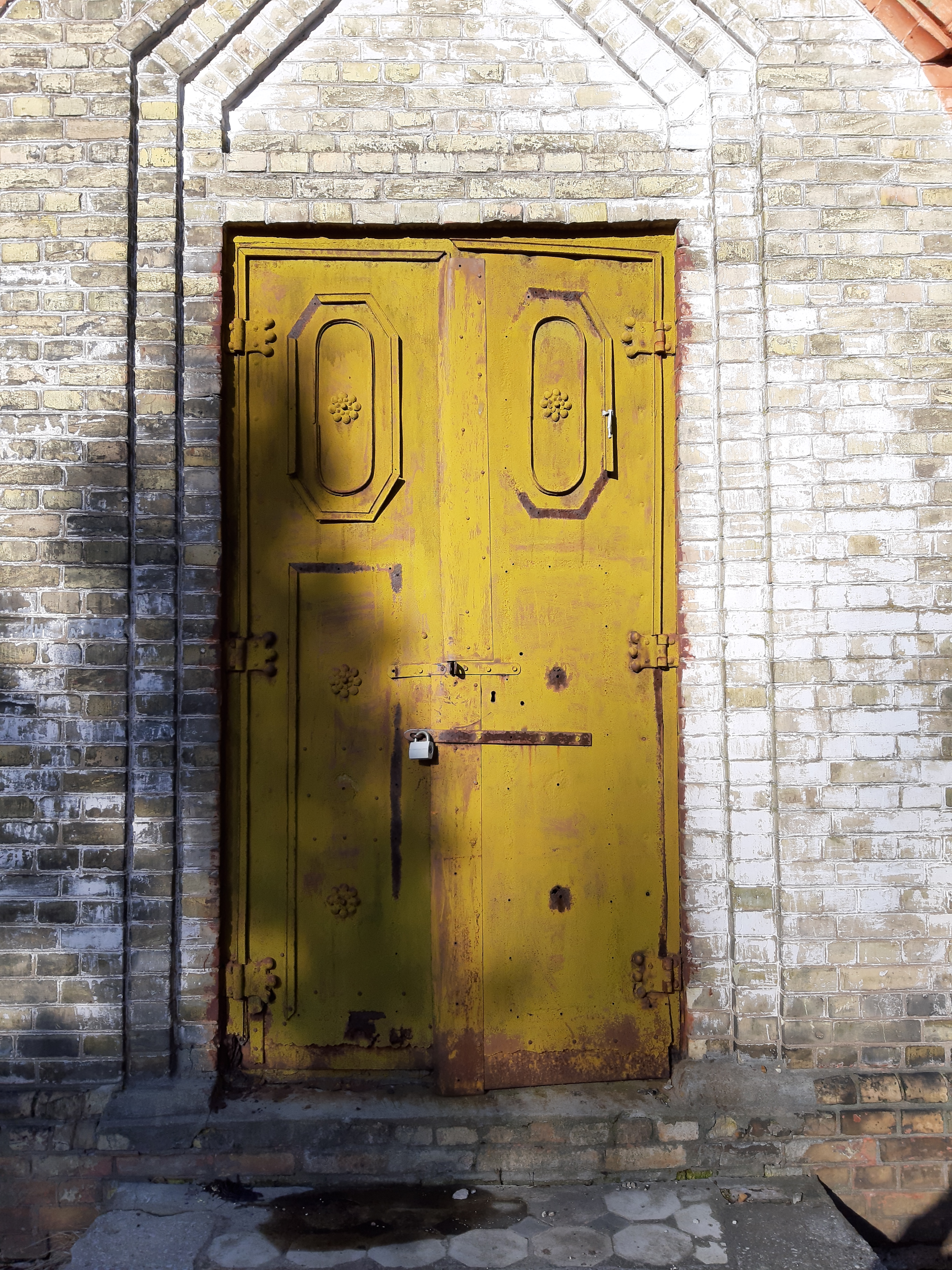 Мінск. Кальварыйскія могілкі. 2020